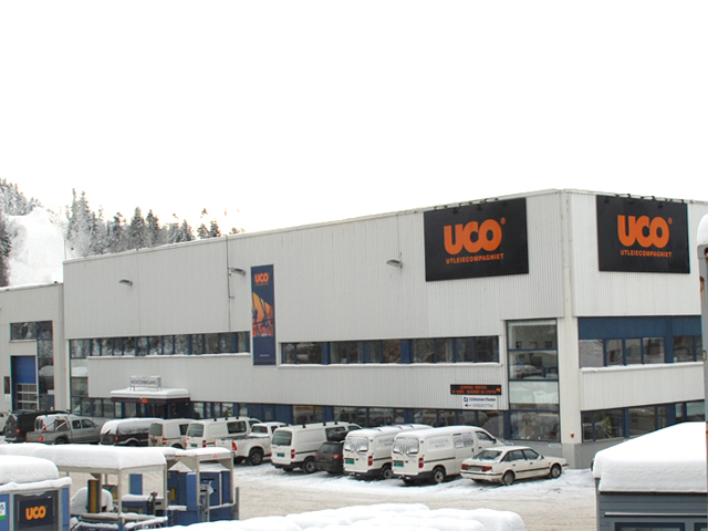 UCO Hovedkontor Kjeller